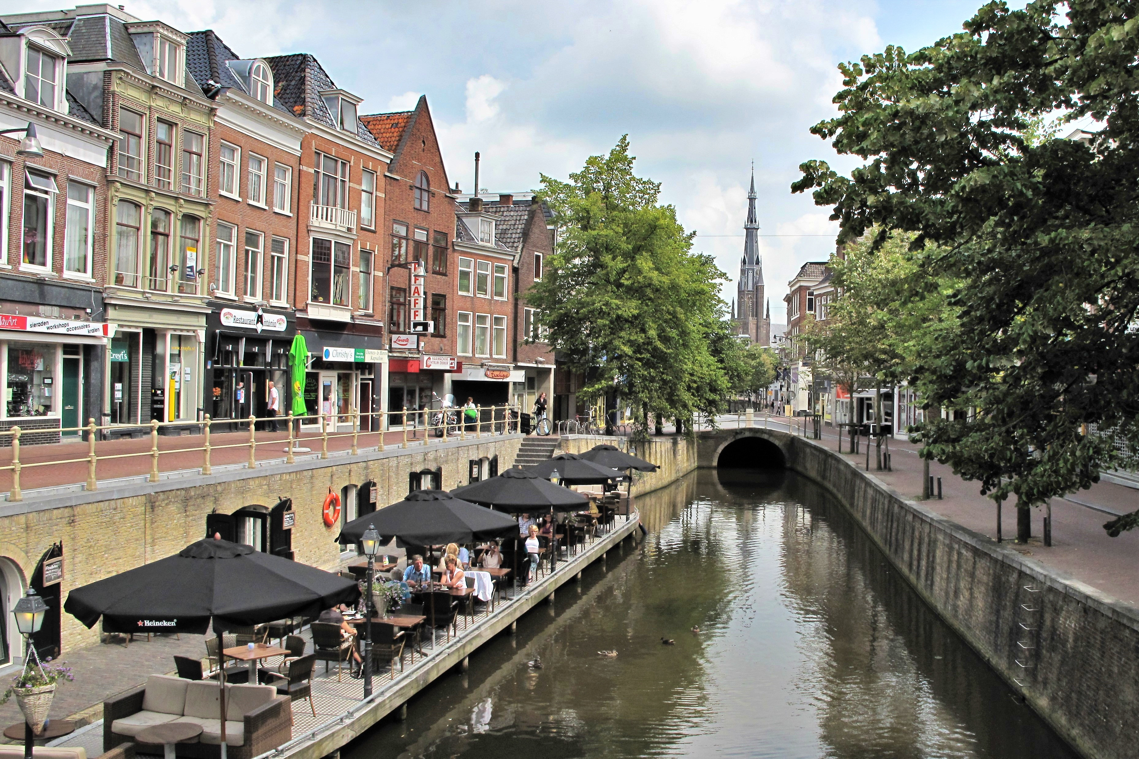 Leeuwarden, Netherlands